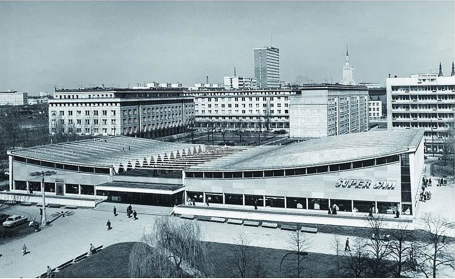 Super Sam w Warszawie - Stan z roku 1969